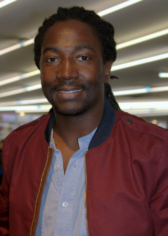 Noom Diawara à l'avant-première de "Qu'est-ce qu'on a fait au bon Dieu ?" à Enghien-les-Bains